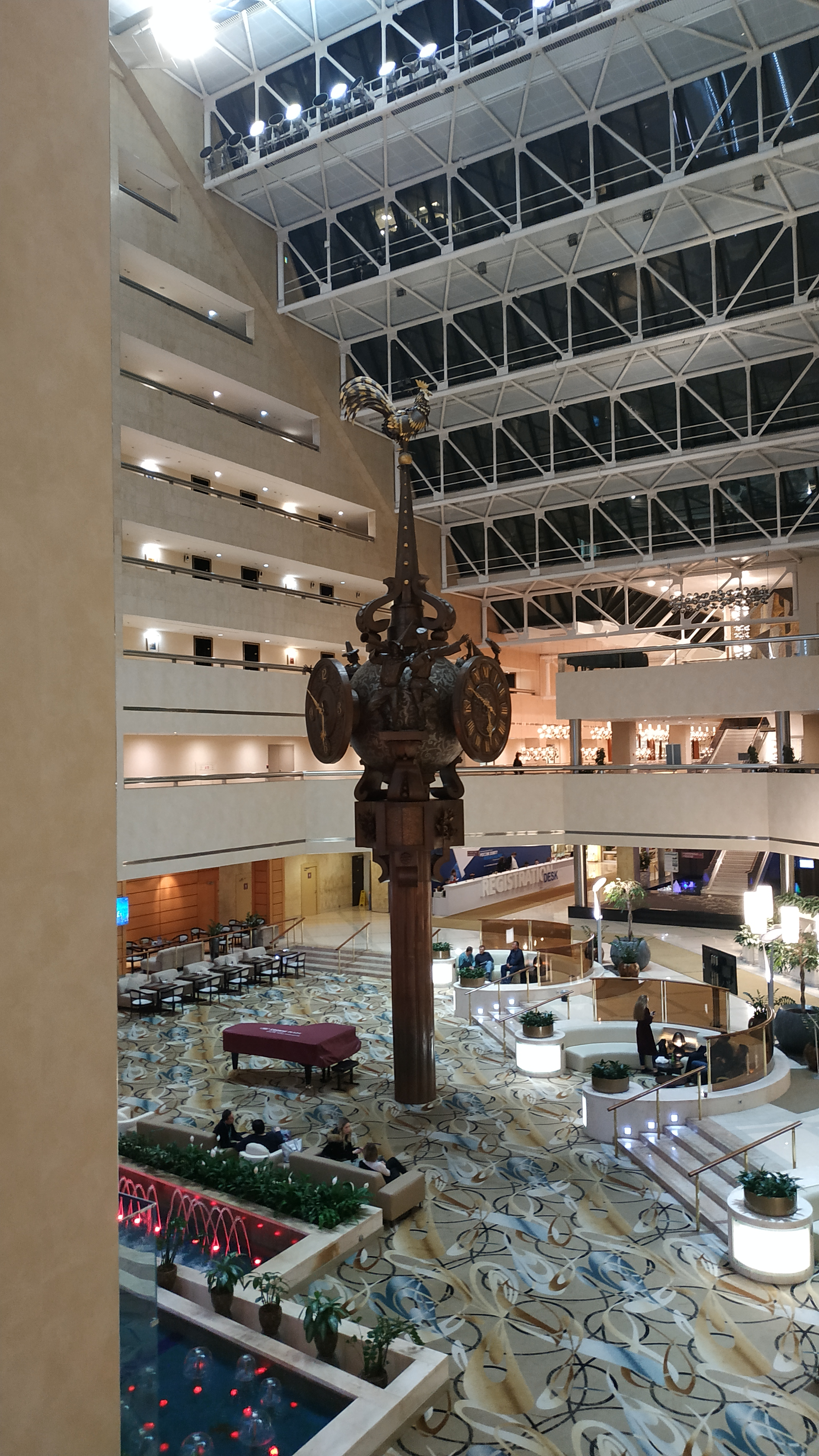 Центр Международной Торговли на Красной Пресне, интерьеры.